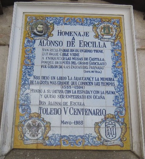 Placa Homenaje a Alonso de Ercilla en el Convento de San José de Ocaña (Toledo).